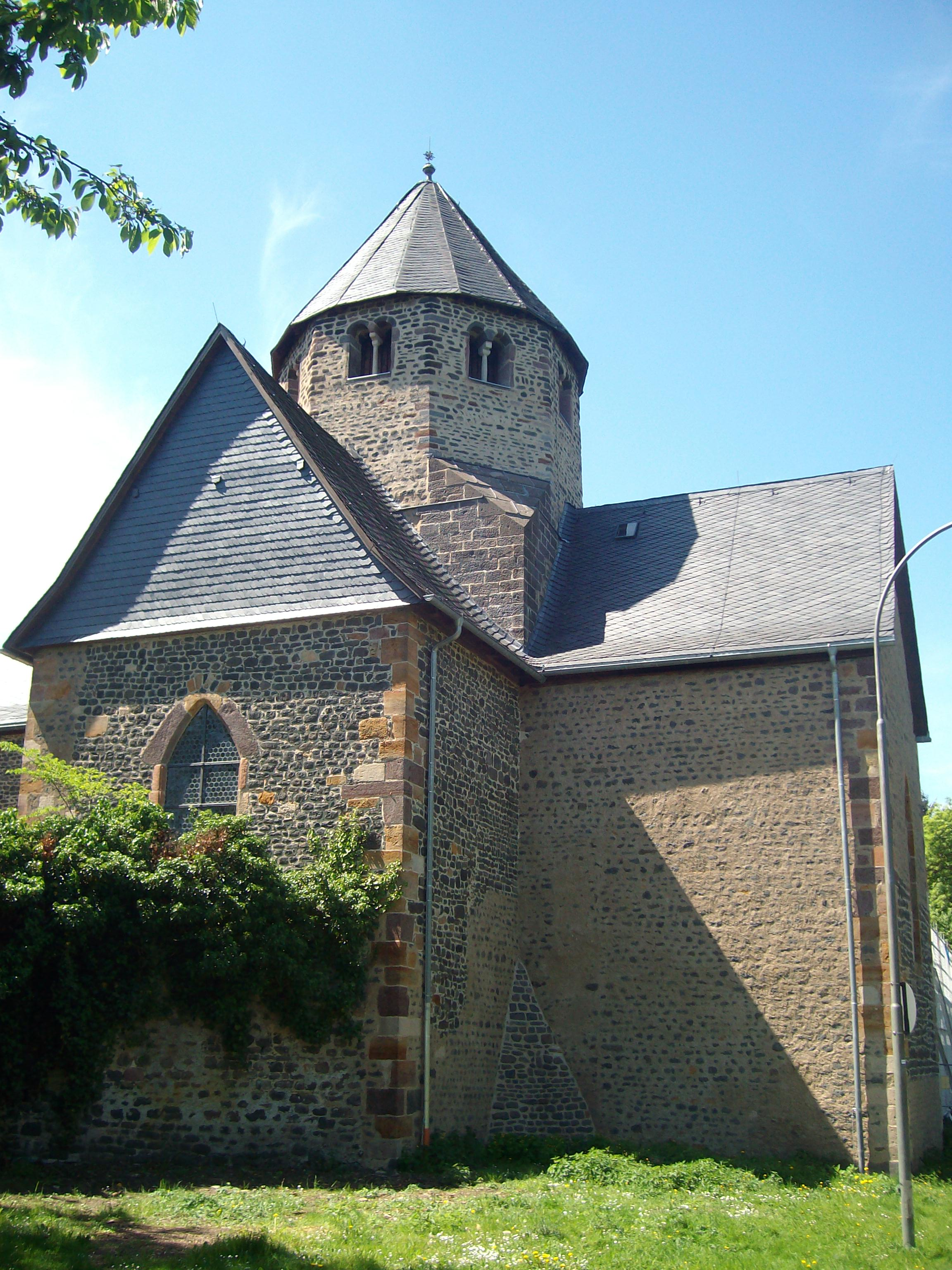 Basilika von Kloster Schiffenberg, Landkreis Gießen, Hessen, Deutschland